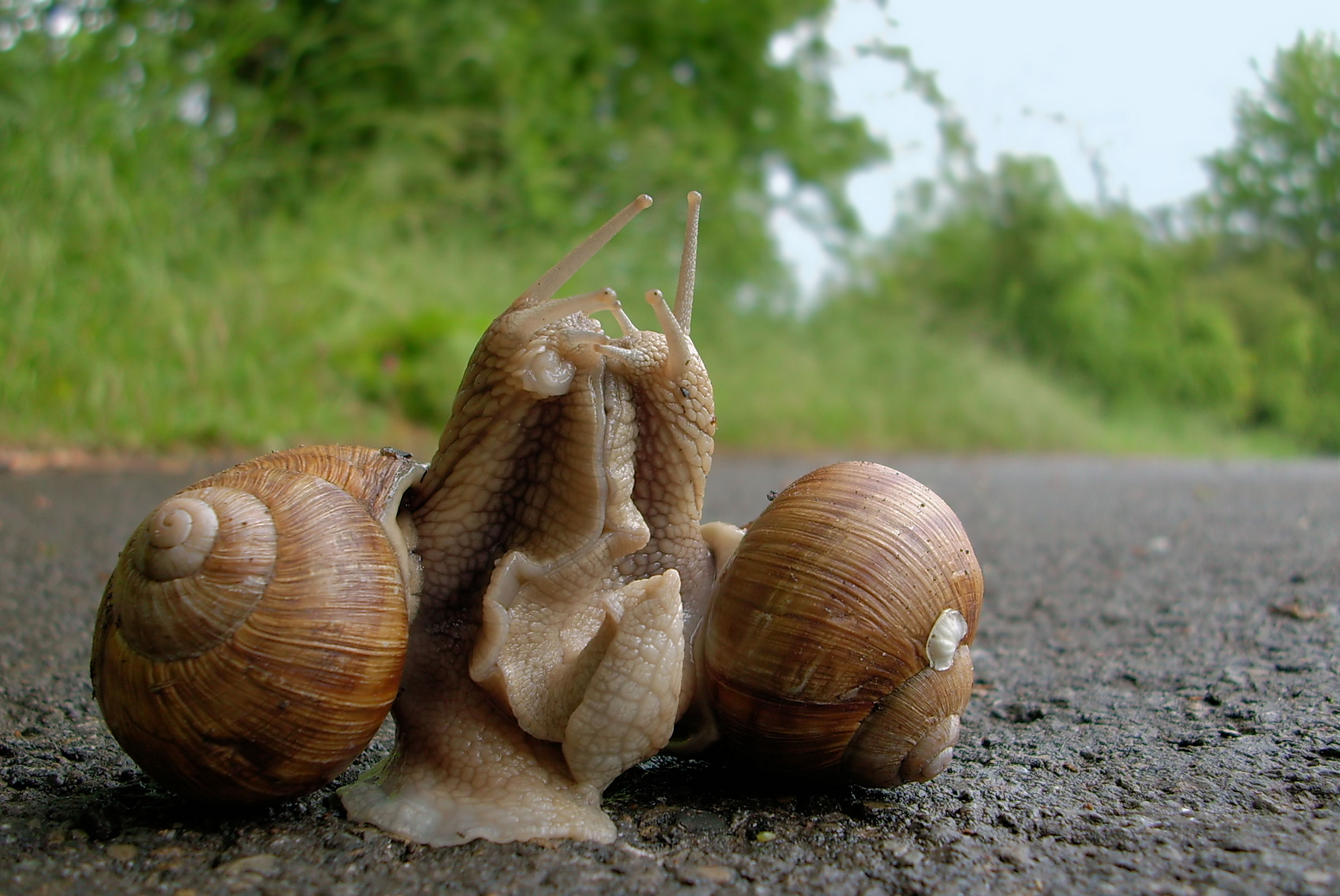 Paarung zweier Weinbergschnecken (Helix pomatia)